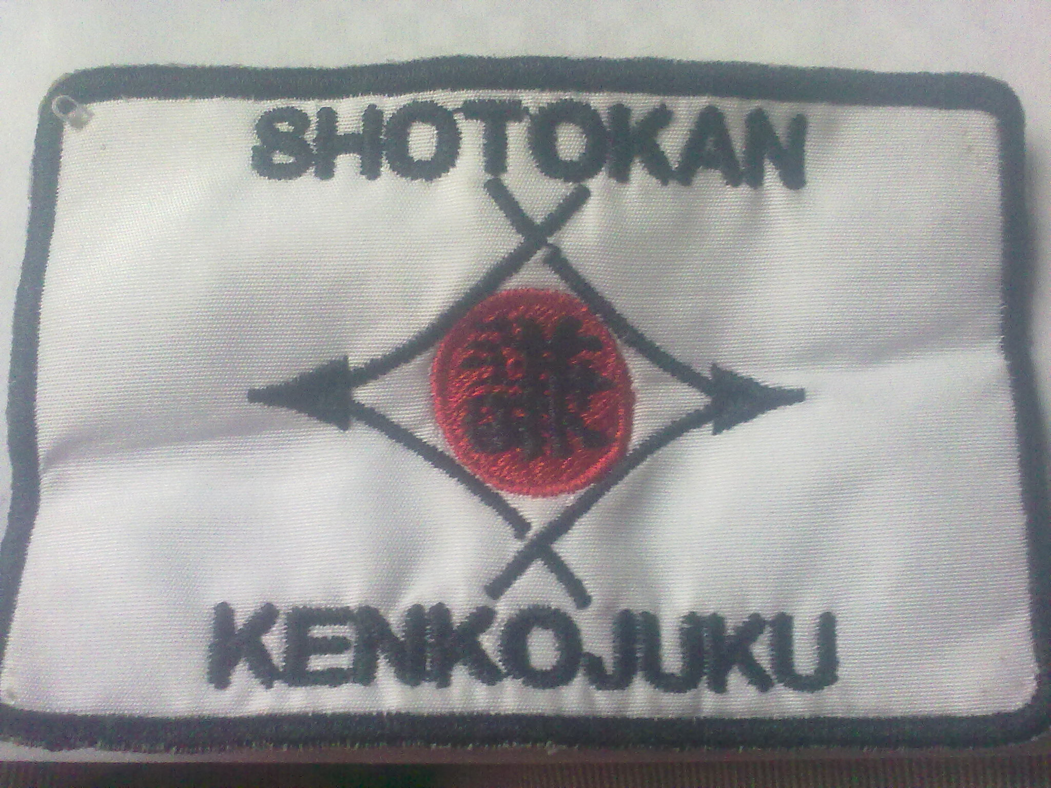 imagen parche grados kyu karate shotokan kenkojuku